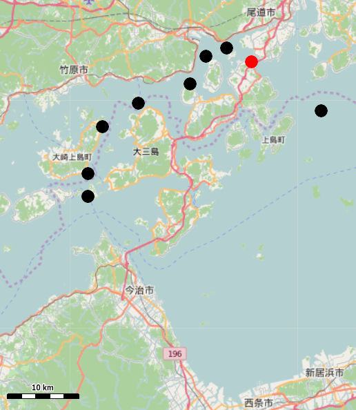 2016年の地図に三原瀬戸航路の灯台の位置を示したもの。大きい丸が大浜崎灯台。 This map may be incomplete, and may contain errors. Don't rely solely on it for navigation.